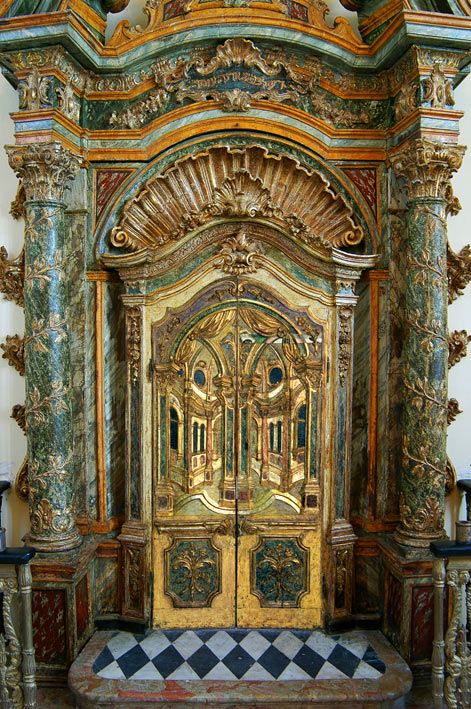 דלתות רון הקודש משוחזרות ממוזיאון הארץ רישיון מצב אישור הועתק לאתר המתאים אני עומד לסיים, היום, את כתיבת הערך על יהדות פיימונטה בוויקיפדיה העברית אני מבקש רשות להשתמש באחת התמונות מהאתר לשכם עבור הערך התמונה בערך תהיה לרשות הציבור ללא הגנה על זכיות יוצרים לכן היא יכולה להיות גם ברזולוזיה נמוכה כך שלא תוכל להיות לשימוש מסחרי אודה לכם אם תוכלו לשלוח לי תמונה אחת לפי בחירתכם כאמור עם רזולוציה נמוכה שעדין מספקת כדי להתרשם אני מניח שהכללת התמונה בערך תוך ציון המוזיאון המארח את הדלת יכול רק לתרום לכולנו, בתודה יהודי איטלקי שאכפת לו מהמורשת היהודית האיטלקית בברכה דניאל ונטורה Miri Tsdaka : אני אפשרויות נוספות 27 מאי דניאל שלום רב, בקשתך, מצ"ב תמונה של ארון הקודש האיטלקי המוצג במוזיאון. נשמח באם תכניסו קישור של המוזיאון: אשמח לעזור גם בעתיד, מירי צדקה קשרי ציבור מוזיאון ארץ-ישראל, תל אביב 03-7455715